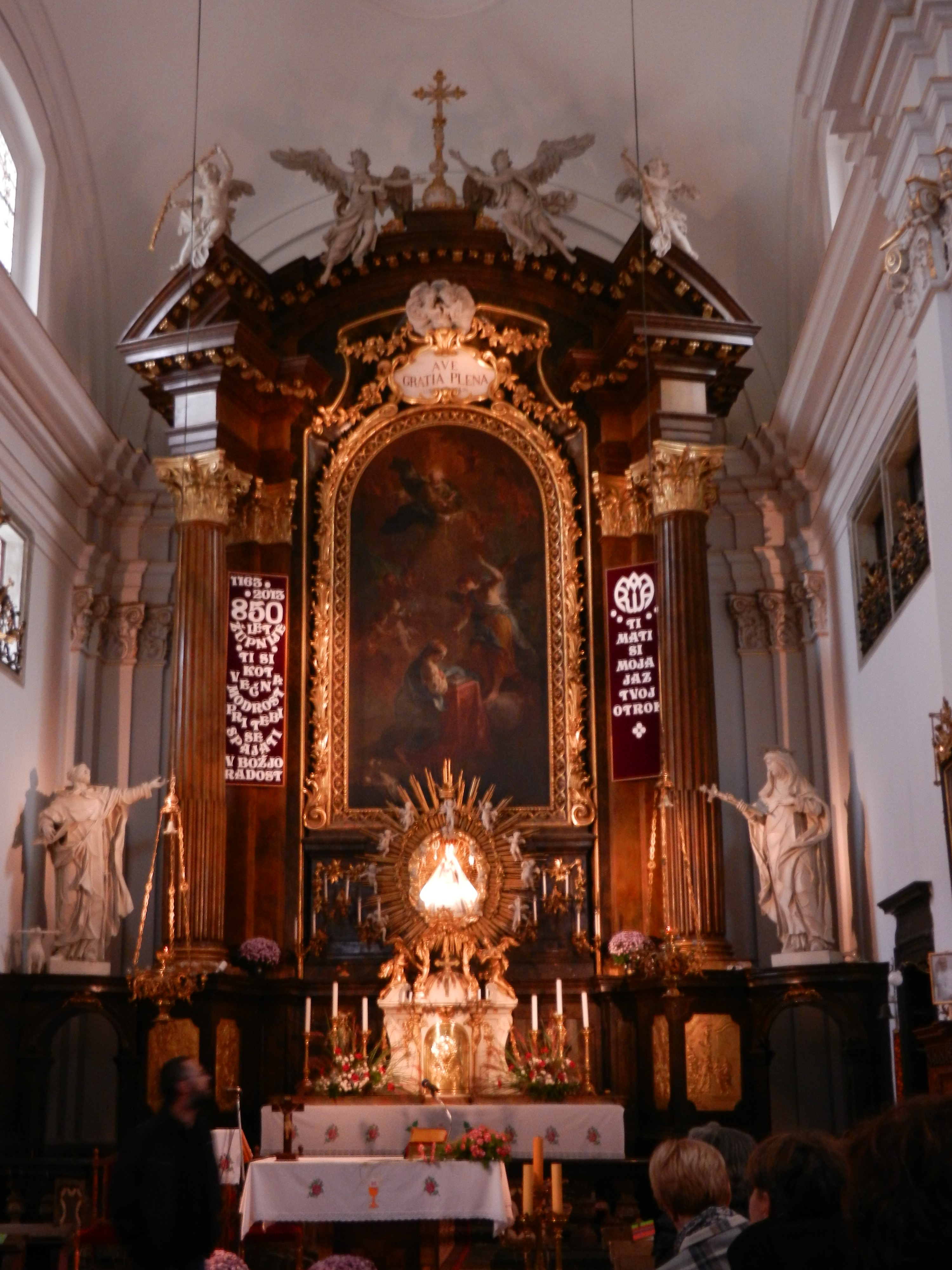 Glavni oltar v cerkvi v Adergasu, Slovenija.